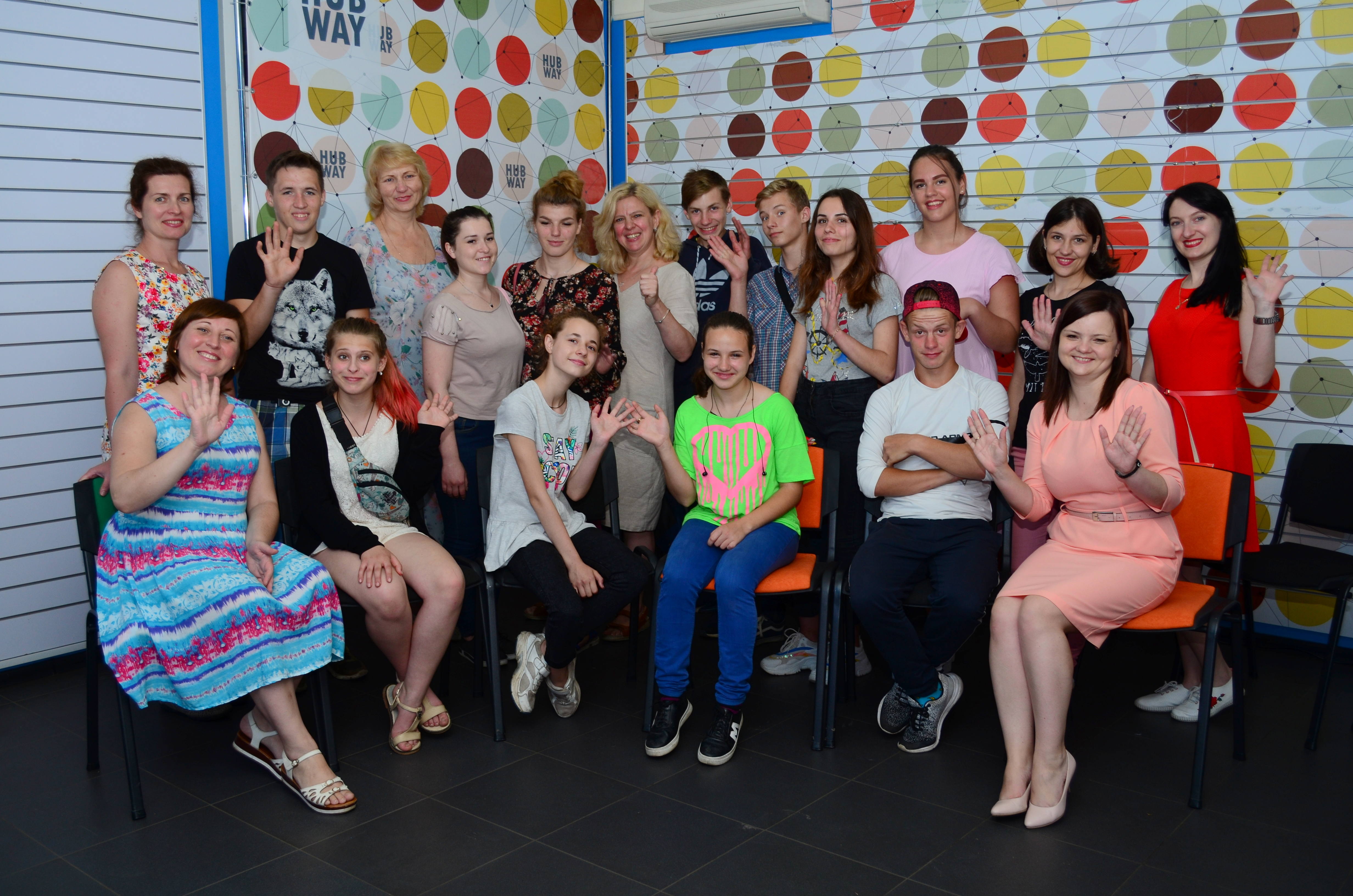 Молодша і старша група